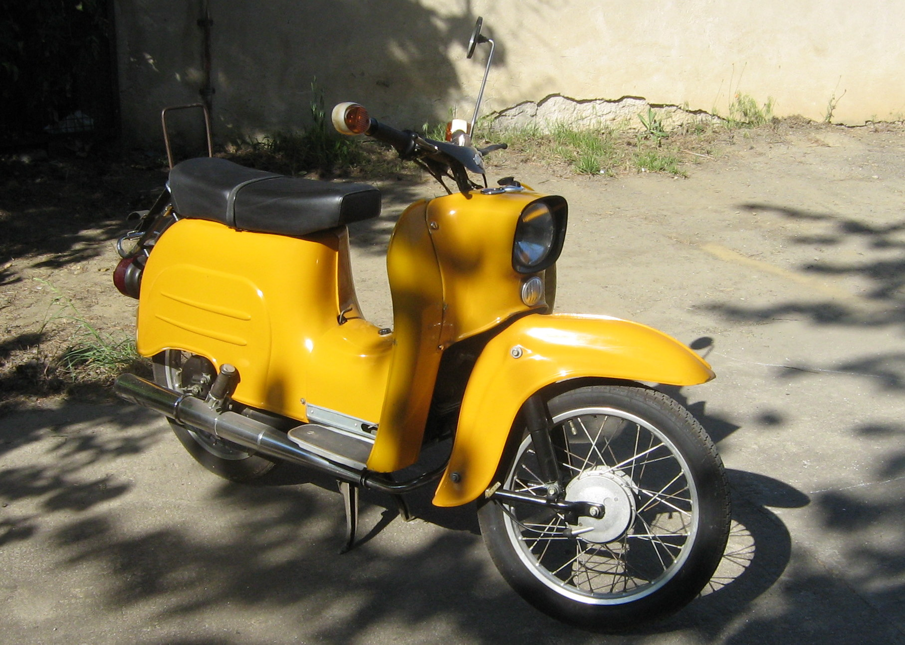 Simson Schwalbe (KR 51/2)